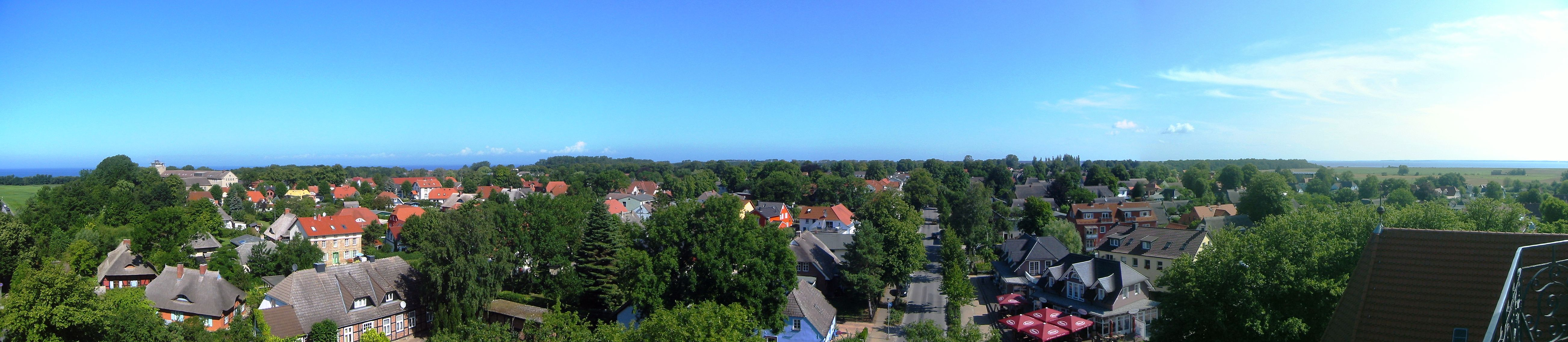 Blick vom Kirchturm der Kirche Wustrow auf die Gemeinde